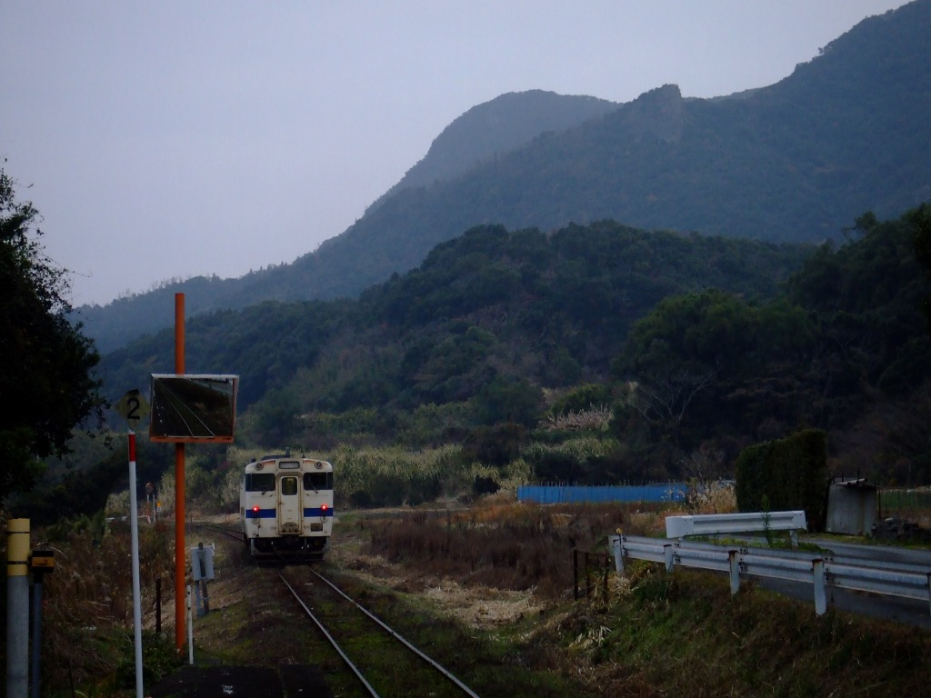 入野駅を出て頴娃駅へ向かう列車。右手には薩摩半島を縦断している巨大断層崖である鬼門平が迫り、山腹に巨石が突き刺さっている矢筈岳も見られる。